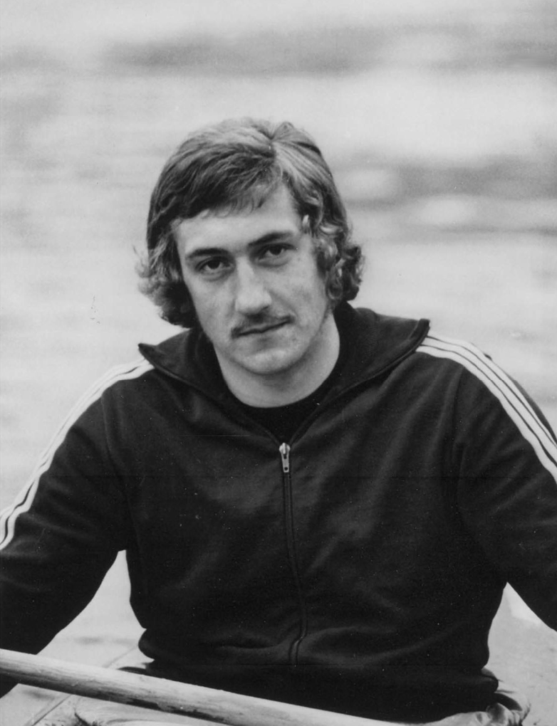 Foto: Franz Zeilner